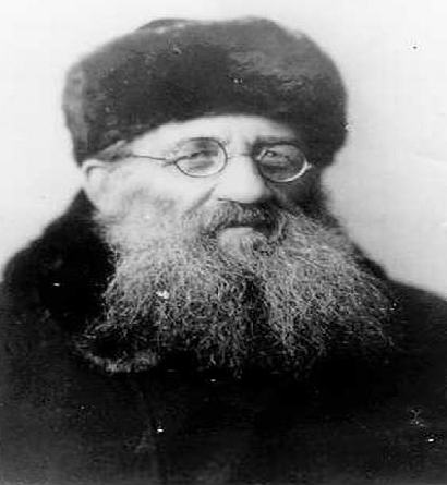 הרב יעקב קלמס, מוסקבה, 1933